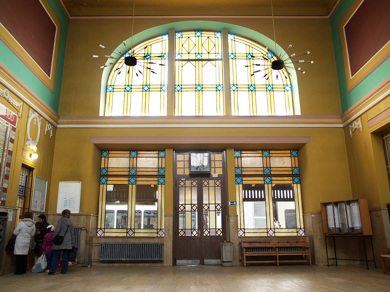 Kežmarok - Železničná stanica (interiér)